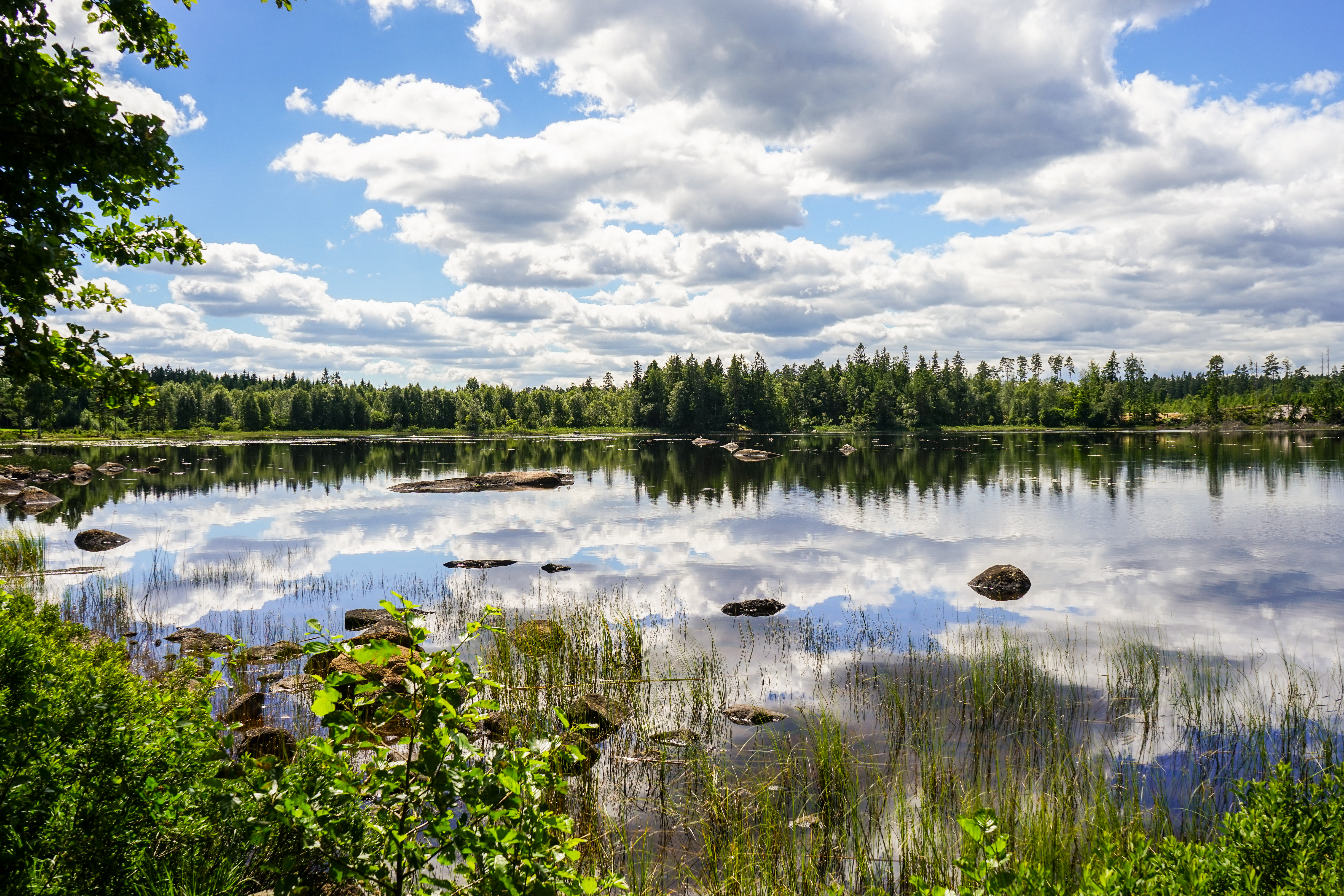 Östergölen